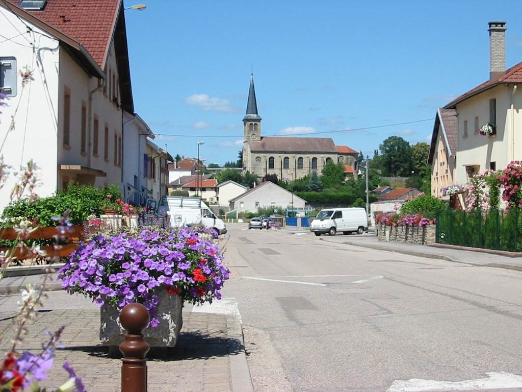 Jeuxey Le centre Commune du canton d'Épinal-Est (Vosges) Photo personnelle du 10 juillet 2006. Copyright © Christian Amet